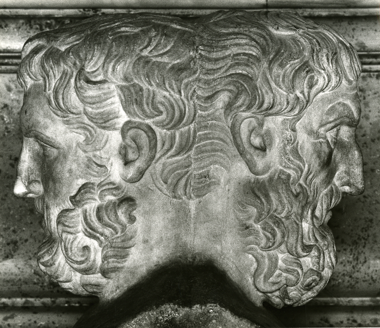 Servizio fotografico : Napoli, 1970 / Paolo Monti. - Stampe: 6 : Positivo b/n, gelatina bromuro d'argento/ carta, 18x24, 24x30. - ((Al verso delle stampe numero di negativo corrispondente: 649, 650/24, 650/32, 654 e iscrizioni manoscritte: "Roma - Museo delle Terme - Particolare di Srcafago". "Roma/ Museo delle Terme/ Il Pugilatore/ 1969", "Napoli - Museo Naz./ Seleuco Nicatore/ Bronzo/ 1969", "Roma/ Museo Terme/ Ara Ludovisi/ 1967", "Erma di Epicuro/ Roma - Museo/ Capitolino". La suddetta serie è contenuta nella scatola identificata con il n. 110. Sul coperchio iscrizione manoscritta a pennarello: "Scultura"